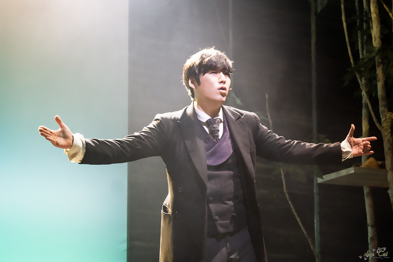 뮤지컬 커튼콜 정상윤 배우님